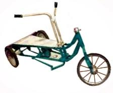 Dibujo de un remociclo, sobre la base de un vehículo original ex propiedad de H. W. López.